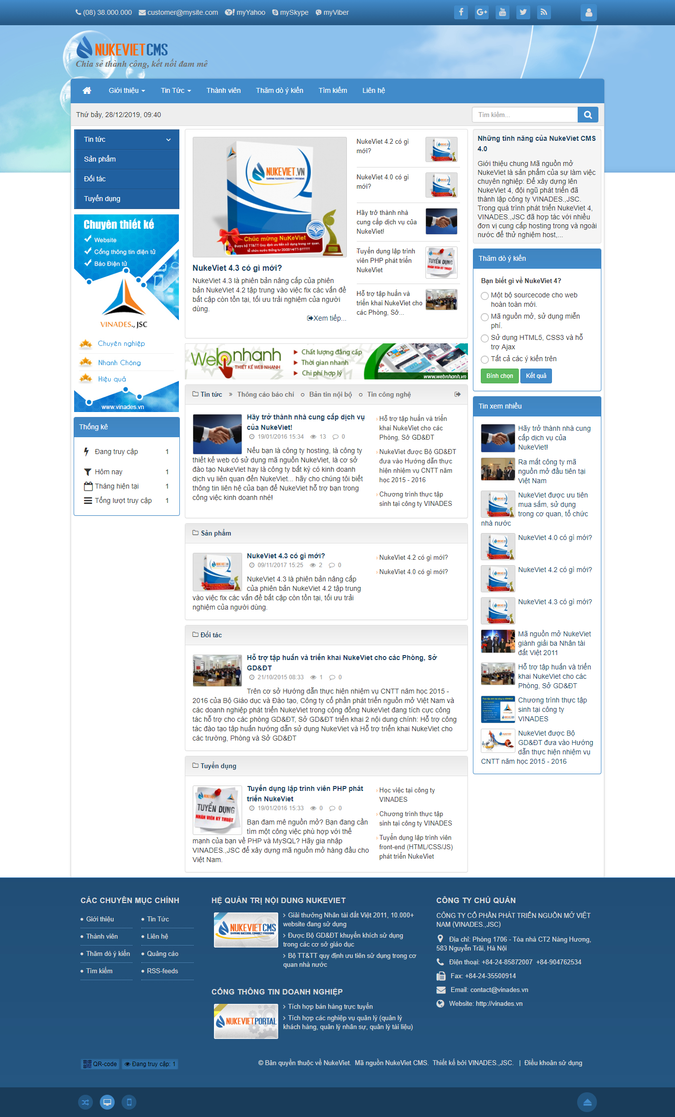 Giao diện người dùng đầy đủ NukeViet 4.3.08 ngôn ngữ Tiếng Việt sau khi cài đặt